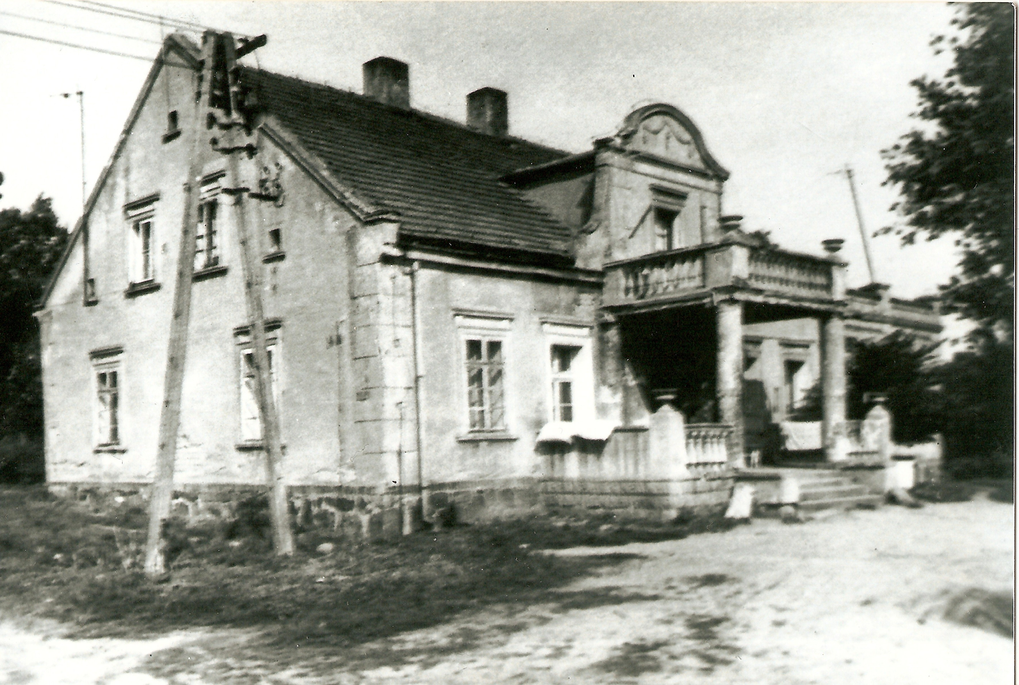 Pałac w Sulinie, druga połowa XIX wieku